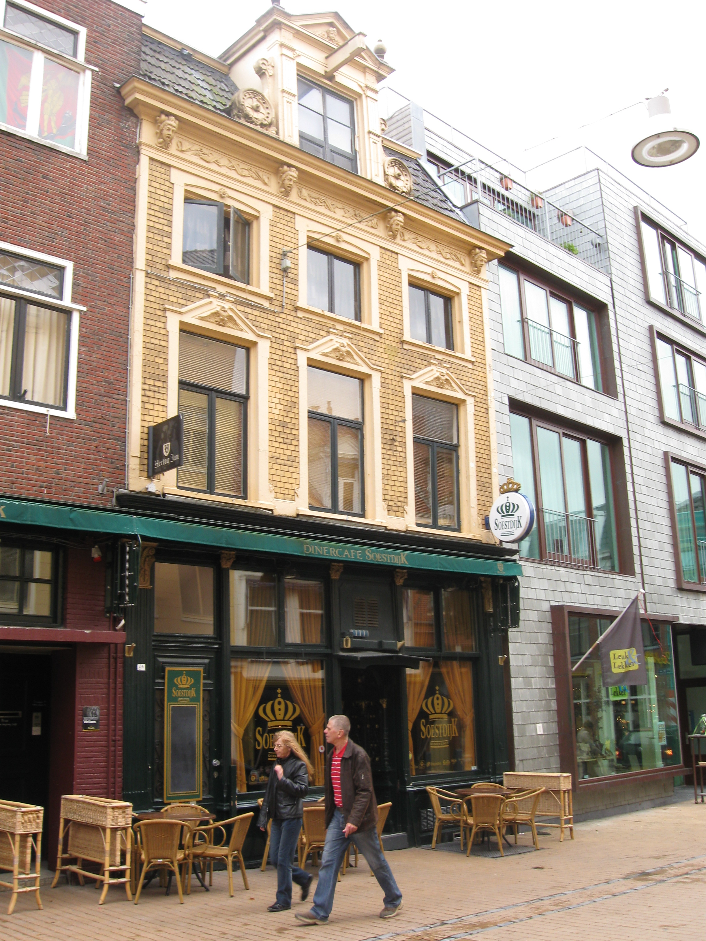 Groningen, Grote Kromme Elleboog 6; verbouwd in 1903 als drogisterij met bovenwoning, ach. P M A Huurman in neo-Renaissancestijl, 3 bouwlagen onder plat dak, met voordakschild en forse kajuit, drie raamtraveeën breed en opgemetseld uit gele verblendsteen, rm 485607